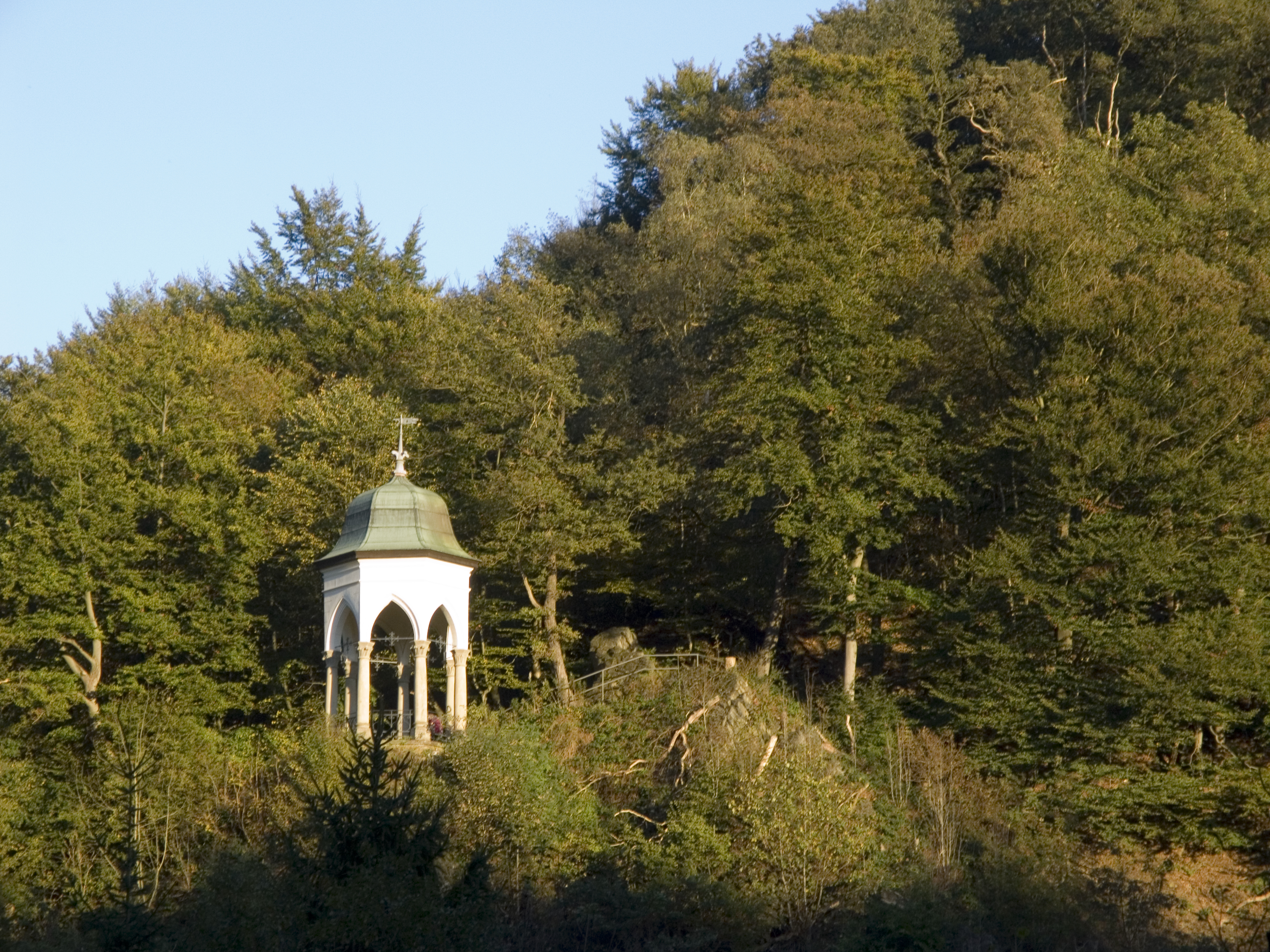 Северный Рейн - Вестфалия, Золинген - Беседка в парке у моста Müngstener